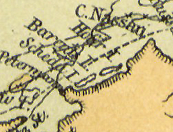 Scheda-Insel (siehe Annotation) auf Novaya Semlya, Nordinsel, nordwestlicher Teil mit Kap Nassau. Auszug aus JONGE(1877) p042 Map of NOVAYA SEMLYA. Diese Insel ist benannt nach dem österreichischen Kartografen Joseph von Scheda, einem maßgebenden Mitglied des Militärgeographischen Institutes in Wien. Die Insel ist ca 4,5 km lang, an ihrer schmalsten Stelle etwa 400 m, an der breitesten etwa 1,1 km breit.